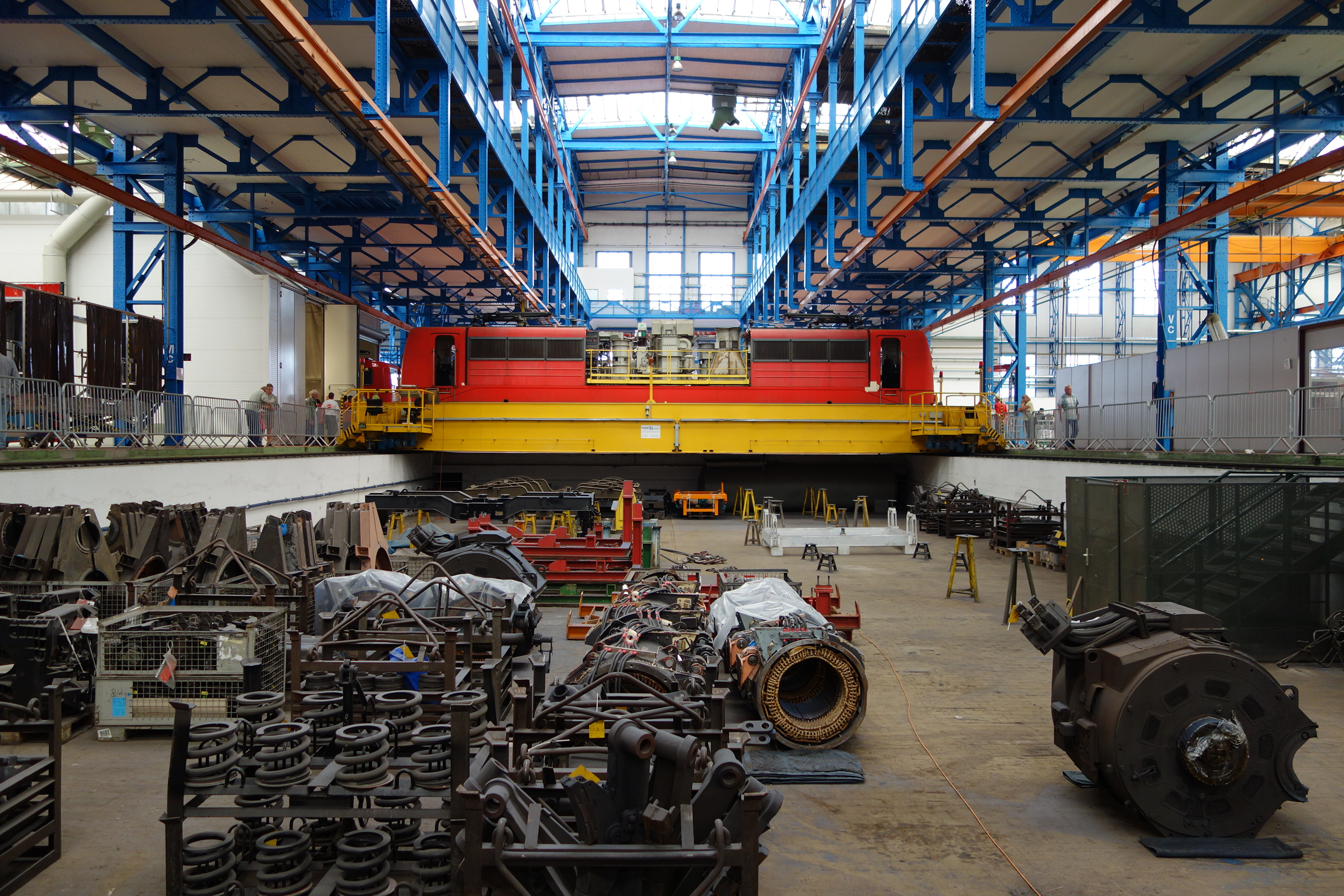 DB Fahrzeuginstandhaltung Werk Dessau, Tag der offenen Tür, Werkshalle mit Schiebebühne